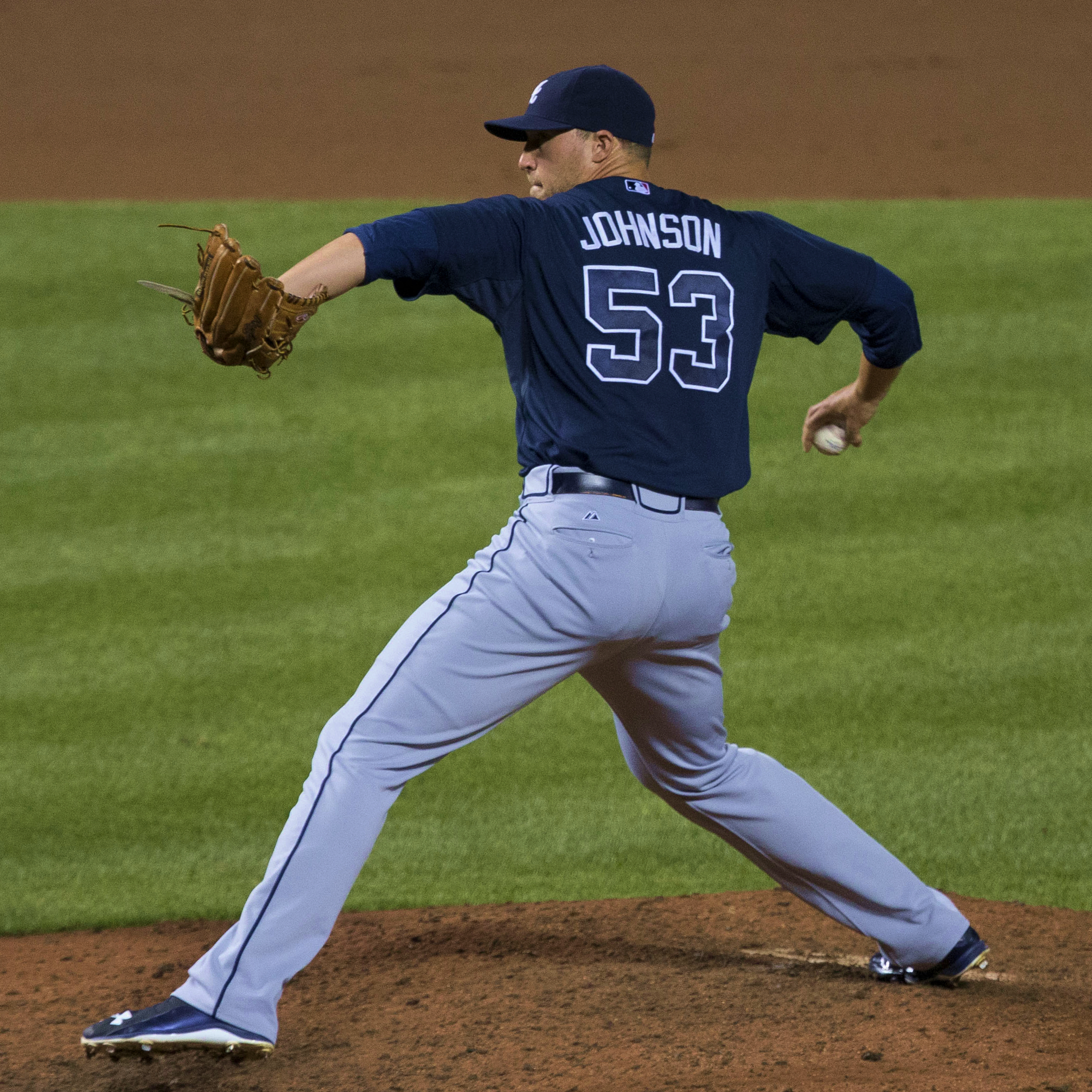 Jim Johnson